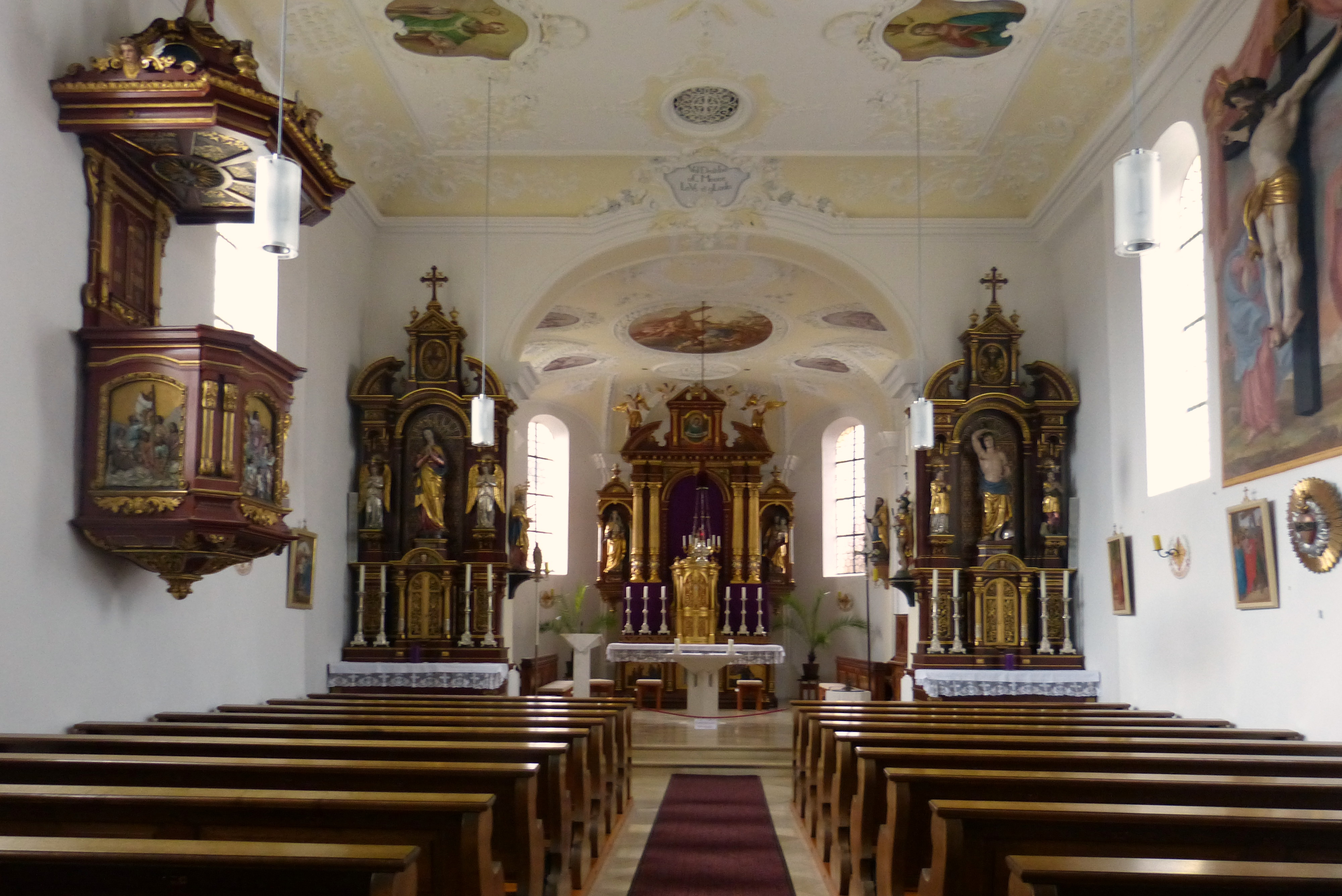 Hirblingen, Pfarrkirche St. Blasius. Innenansicht. This is a photograph of an architectural monument.